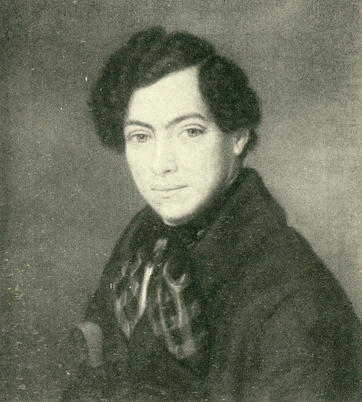 Johann Velten: Jugendporträt des späteren Geheimen Admirabilitätsrats P.M.J. Coupette, 1845, Ölgemälde, 32 x 29 cm.